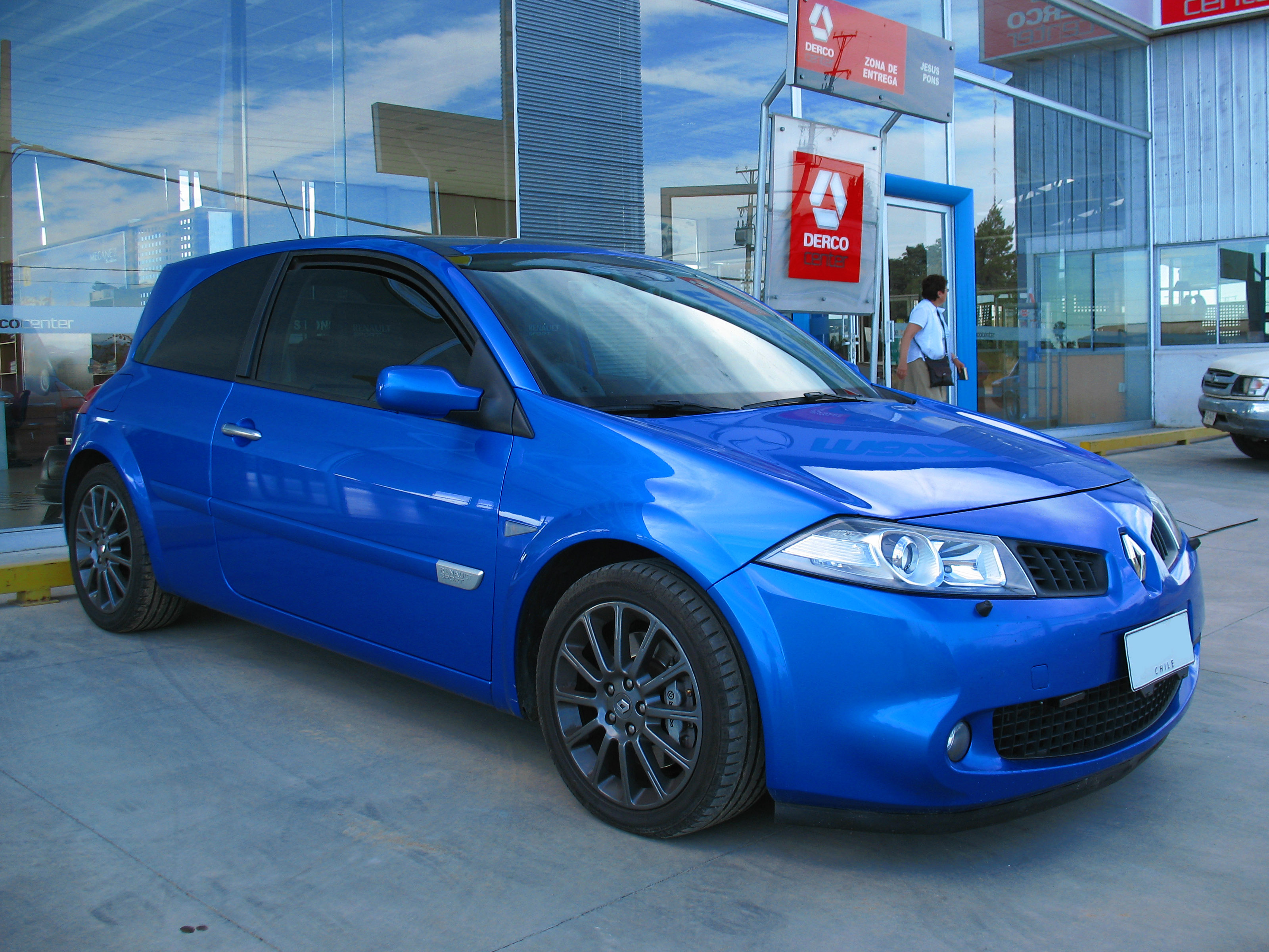 Renault Megane Sport 2007